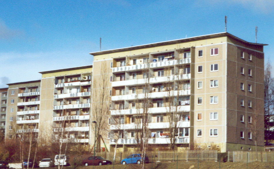 Drei unsanierte DDR-Wohnblocks auf der Pörlitzer Höhe in Ilmenau (Kopernikusstraße). Also noch die "Originalfarbe" von DDR-Zeiten. Das "Poehoe" im Lemma bedeutet "Pöhö" und ist die gebräuchliche Abkürzung von "Pörlitzer Höhe".